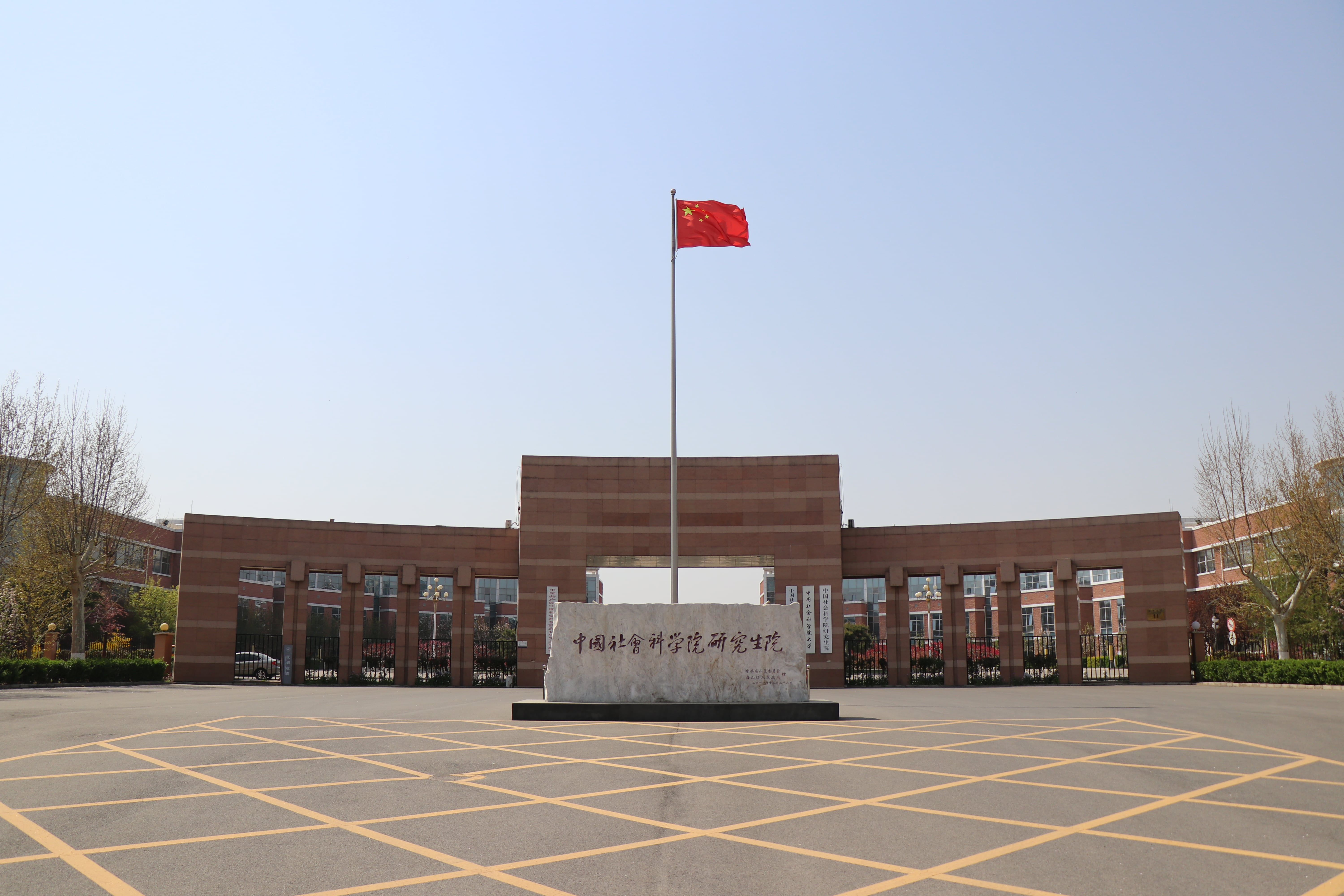 2019年4月，中国社会科学院大学东门景观。校门前石碑上仍然是“中国社会科学院研究生院字样”，“中国社会科学院大学”牌在校门北侧门柱上。 April 2019, East gate landscape of the University of Chinese Academy of Social Sciences. The stone monument in front of the school still says "Graduate School of the Chinese Academy of Social Sciences", and the "University of Chinese Academy of Social Sciences" brand is on the north side of the school gate.